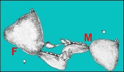 Schéma d'un accouplement d' Argyrodes